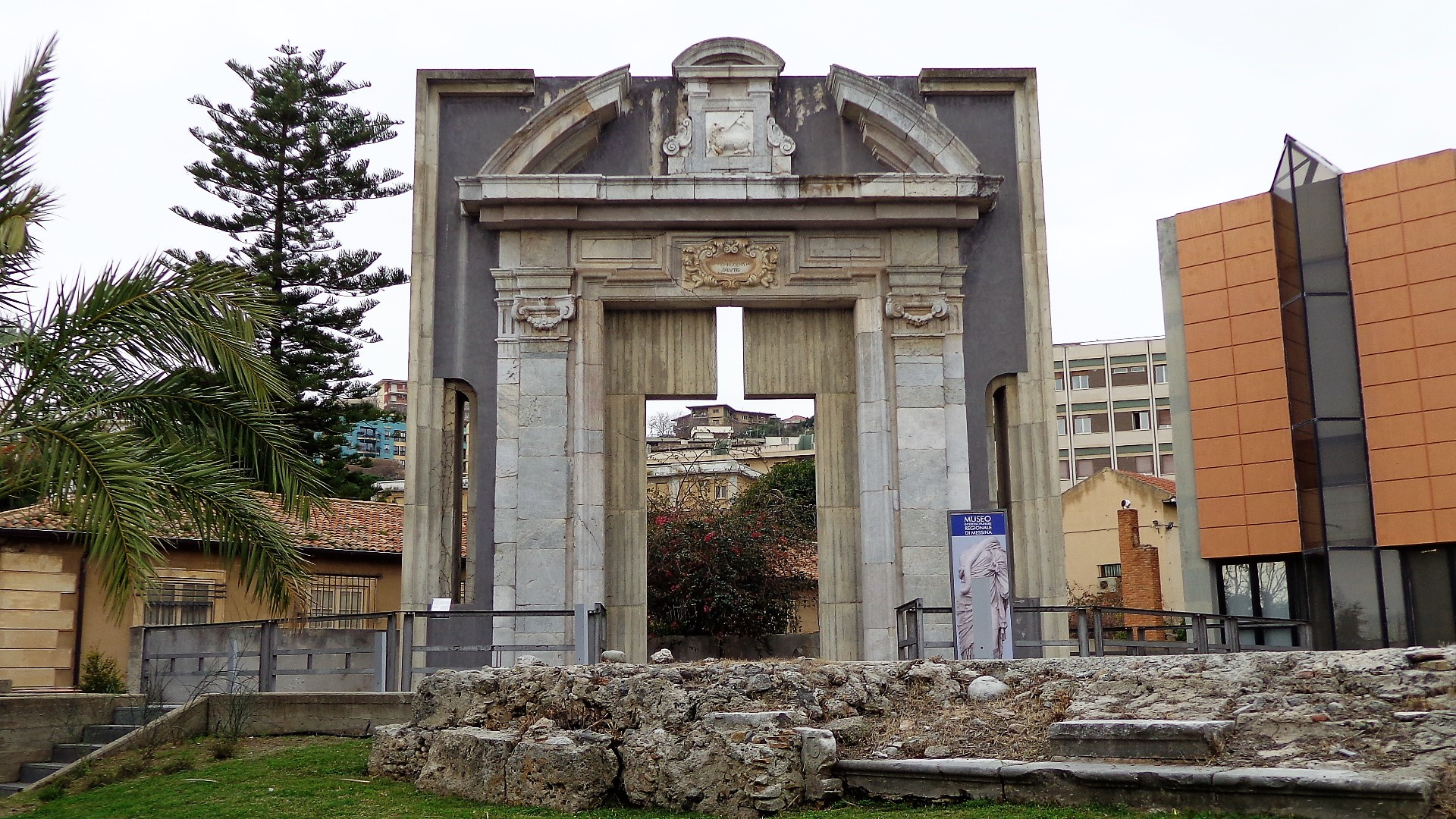 Portale